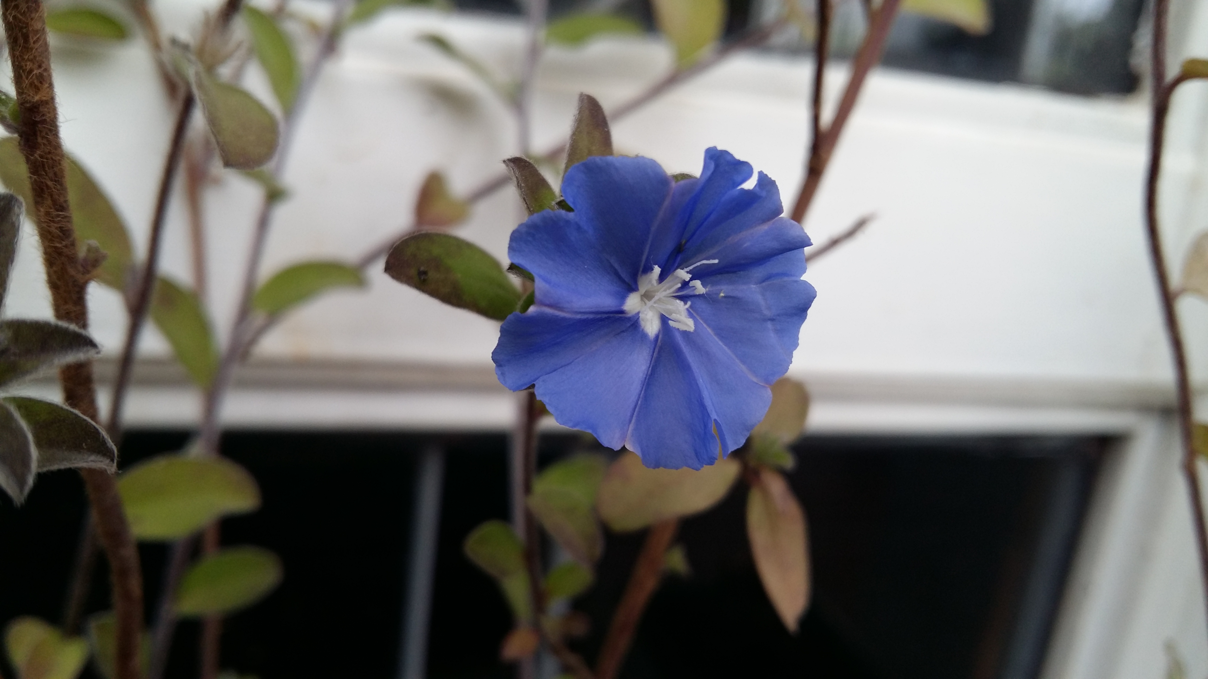 Foto tirada em Mairiporã-SP